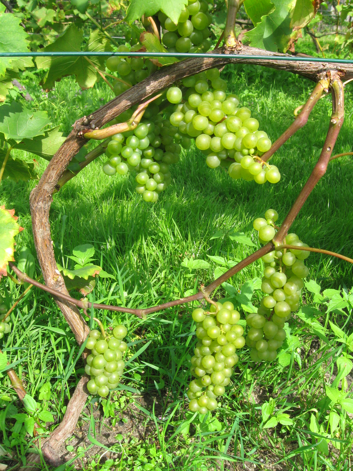 Owocujący krzew odmiany 'Bianca'